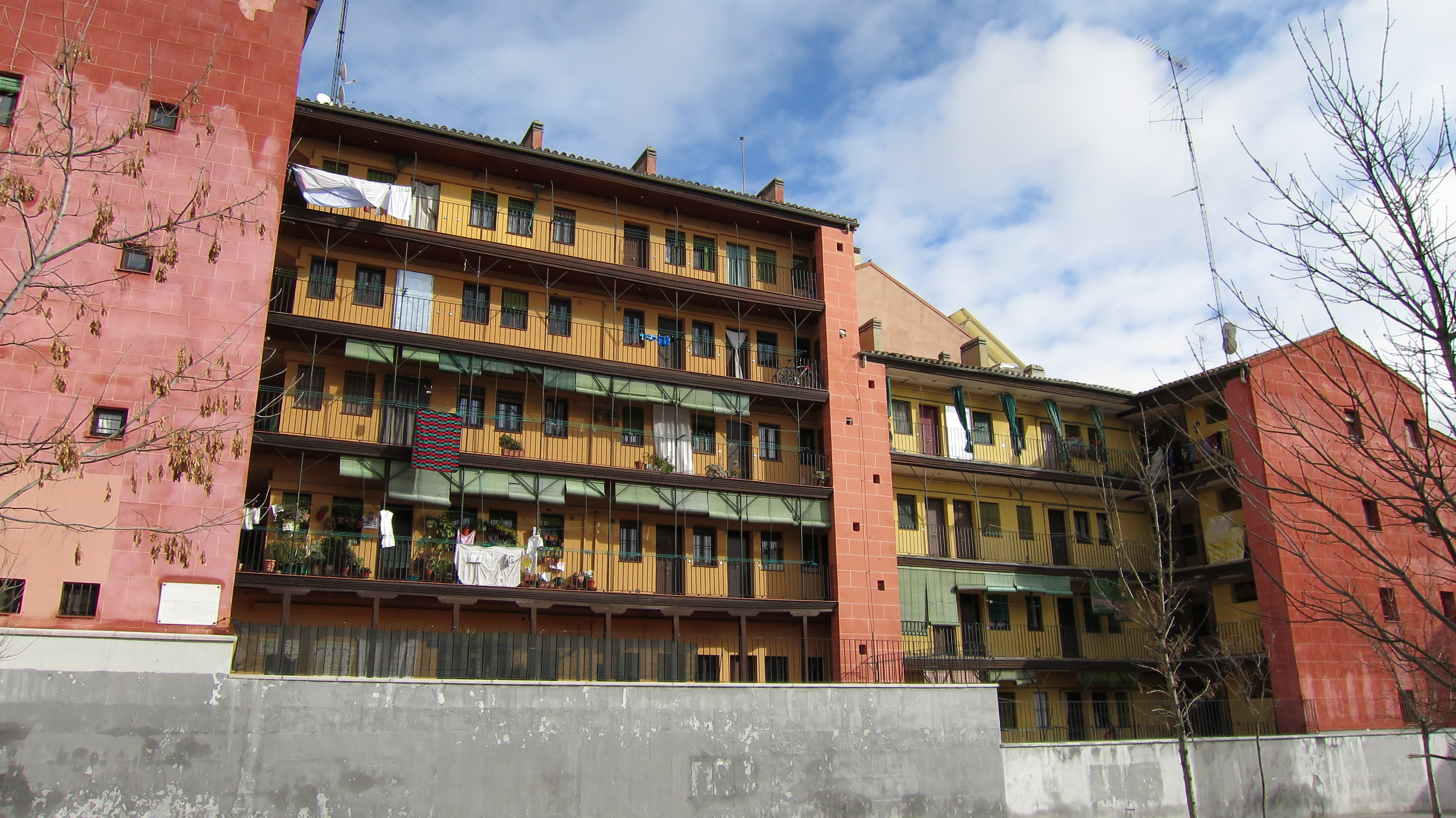 Corrala, Lavapiés, Madrid, España.